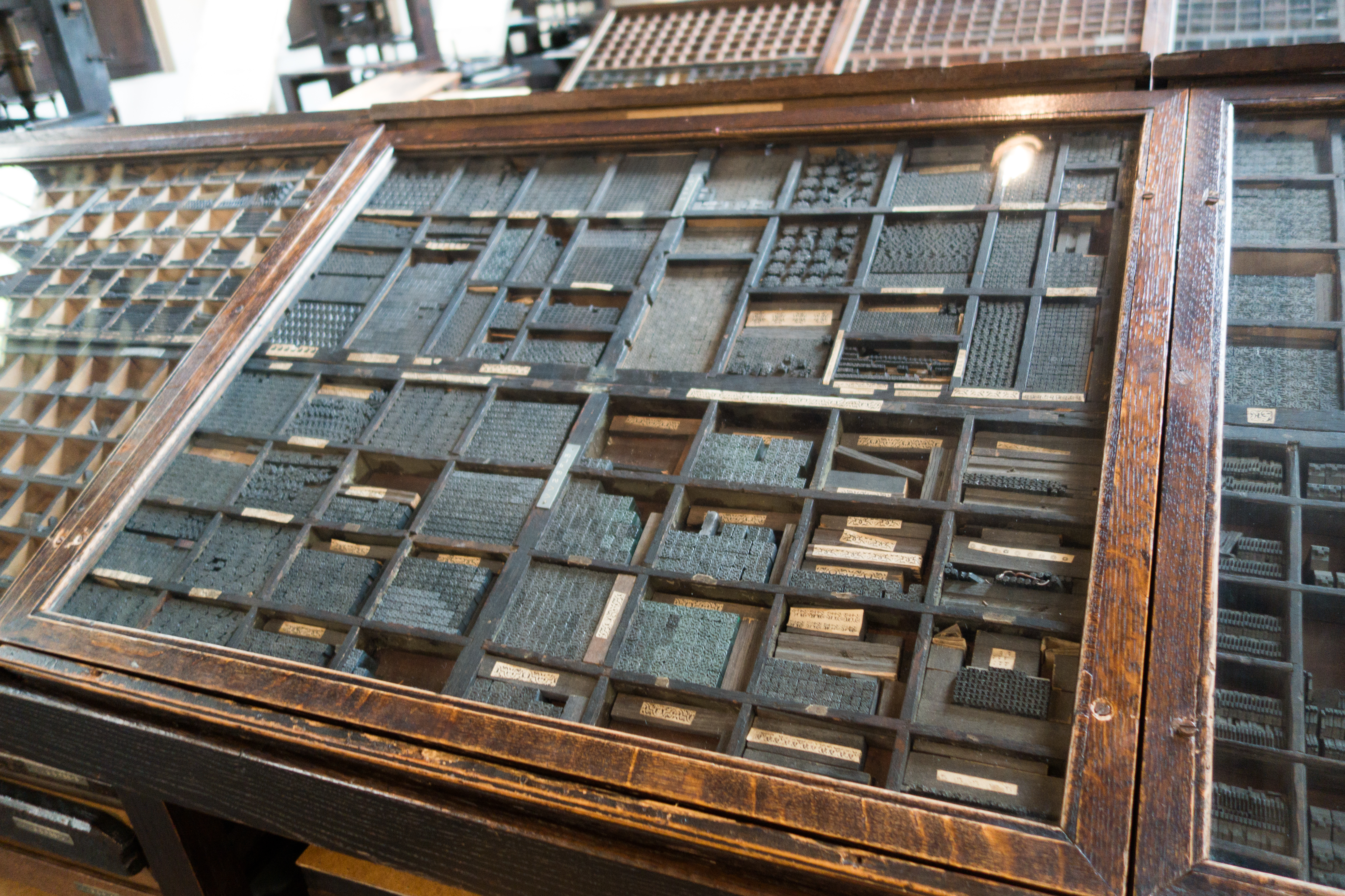 Belgium